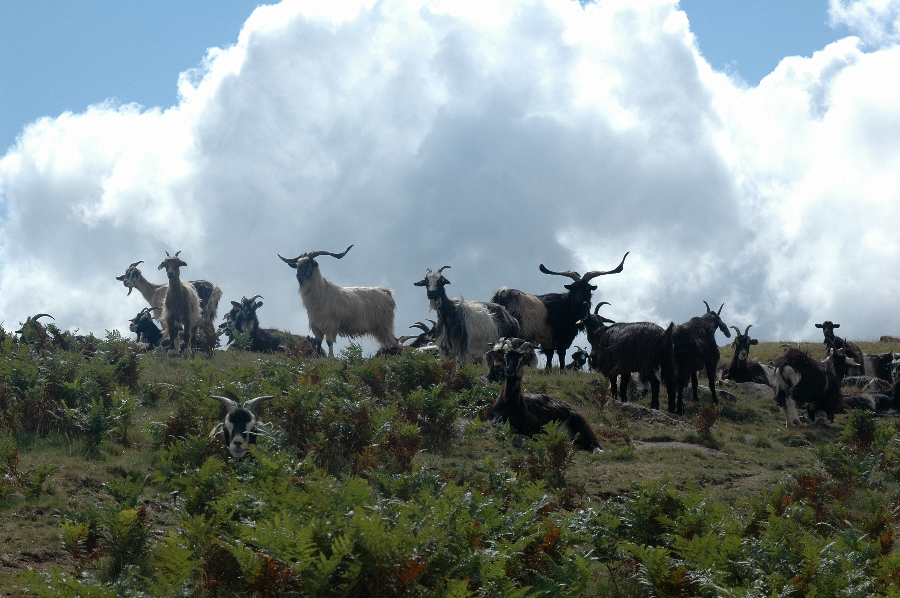 Saint-Étienne-de-Baïgorry, chèvres sur les crêtes d'Iparla. Photo prise le 11/08/06 par Harrieta171